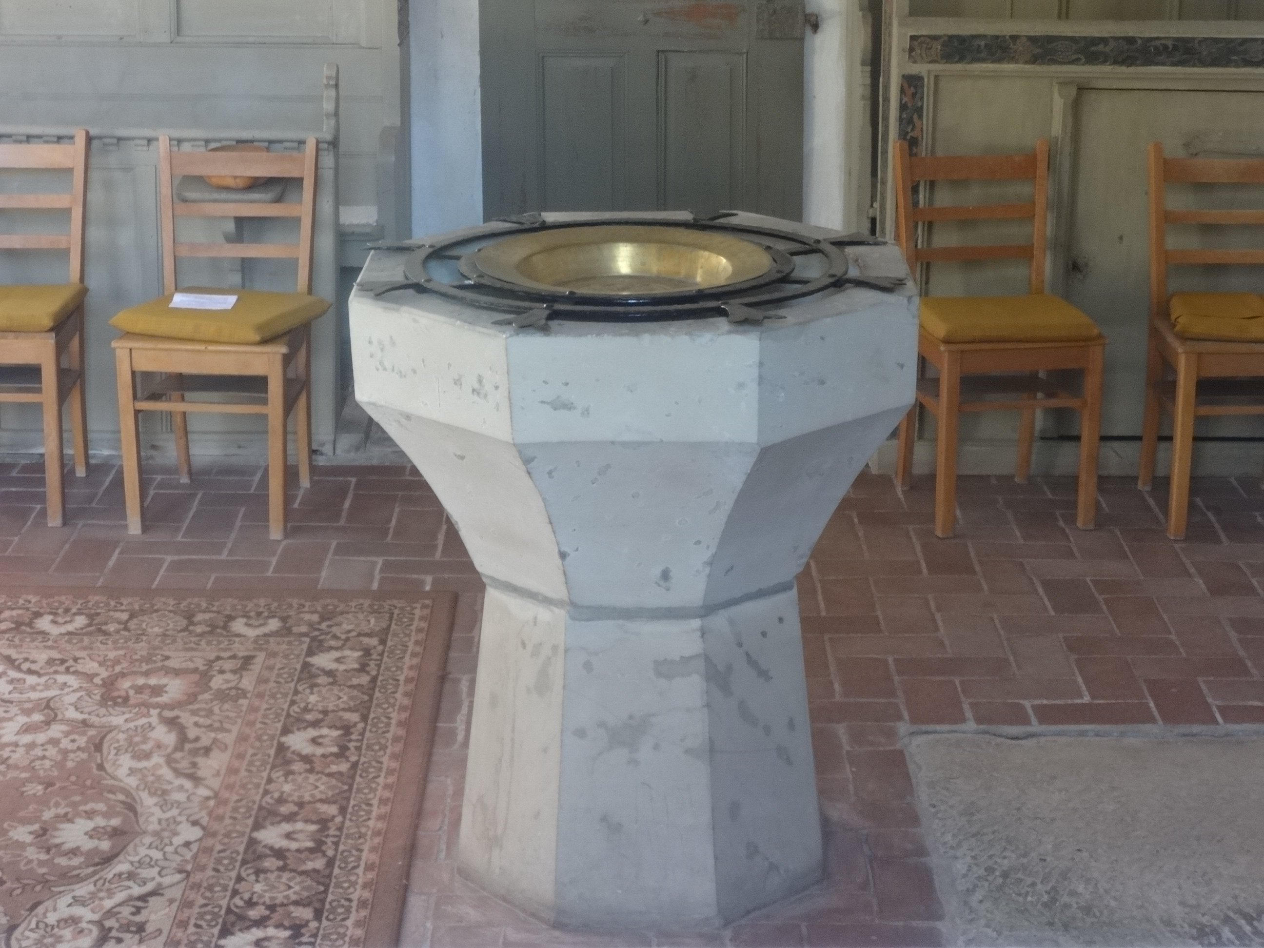 Dorfkirche Bardenitz: Kirche aus der ersten Hälfte des 13. Jahrhunderts, der als einziger Sakralbau in der Region aus Backstein errichtet wurde. Das Bauwerk wurde mehrfach umgebaut. Im 15. Jahrhundert riss die Kirchengemeinde die Apsis sowie die Nord- und Ostseite des Chores ab. Die Südwand blieb stehen und ist heute noch erhalten. Der Chor wurde mit einem geraden Abschluss neu errichtet, höher gezogen und überragte seither das Kirchenschiff. Im Innern befindet sich ein Altaraufsatz aus dem Jahr 1721, der die Kreuzigung Christi zeigt. In der Sakristei steht darüber hinaus ein Flügelaltar aus den 1960er Jahren vom Kleinmachnower Bildhauer Hermann Lohrisch.